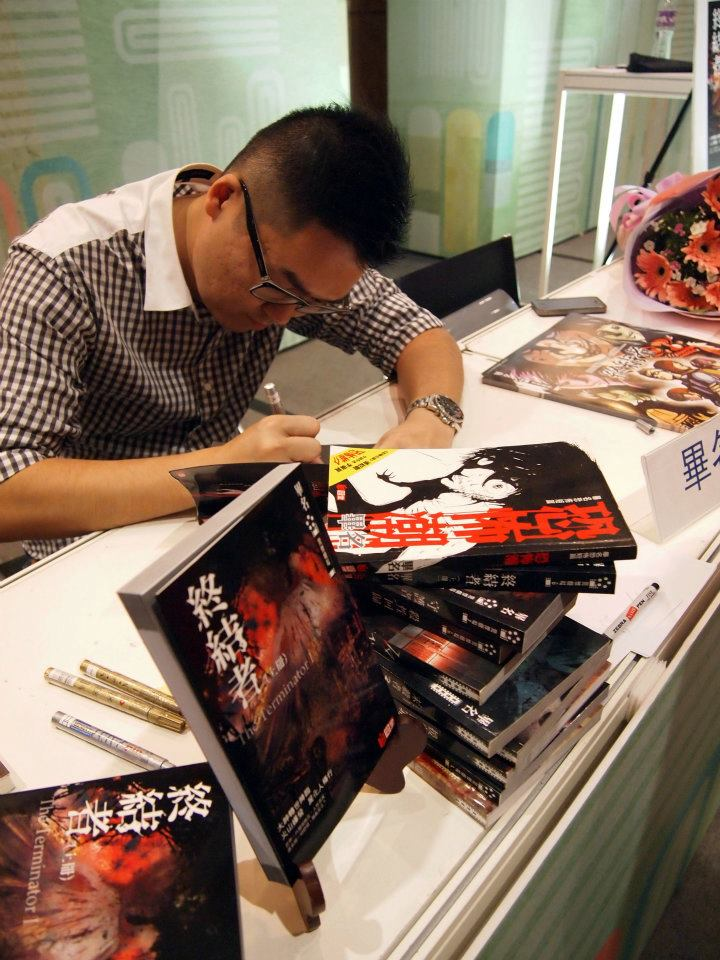 中文（香港）: 畢名 - 2012年香港書展簽名會。